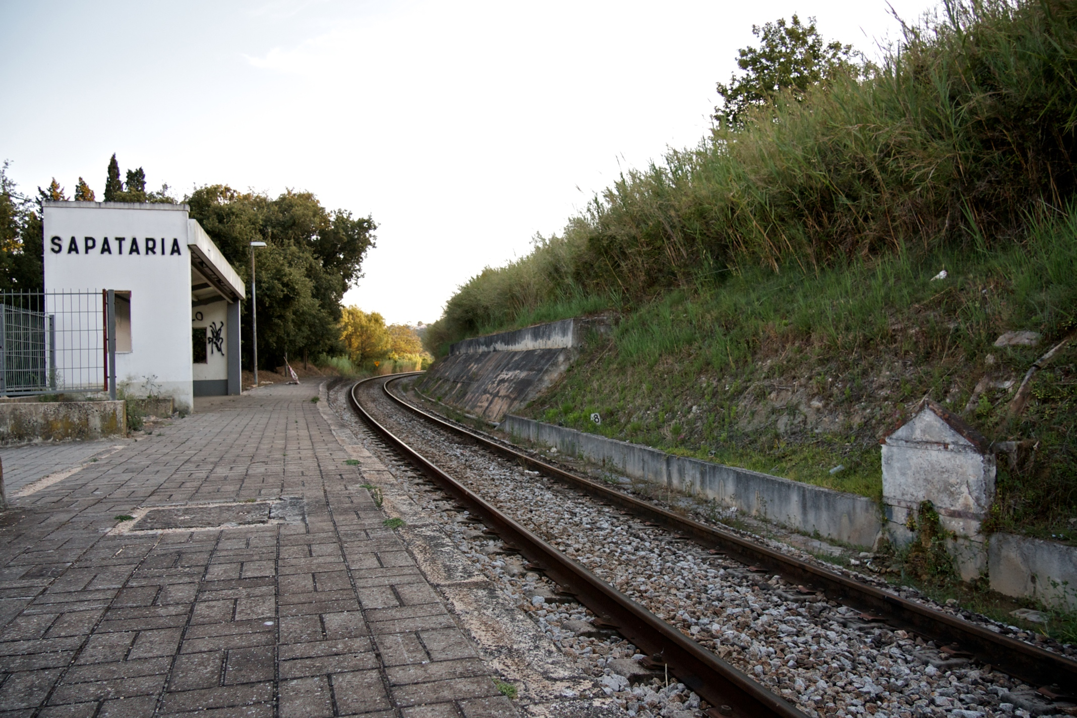 Tipo: A Apeadeiro Local: Sapataria [Linha do Oeste, PK 45] Data e hora: 10 de Agosto de 2011 [19h48]